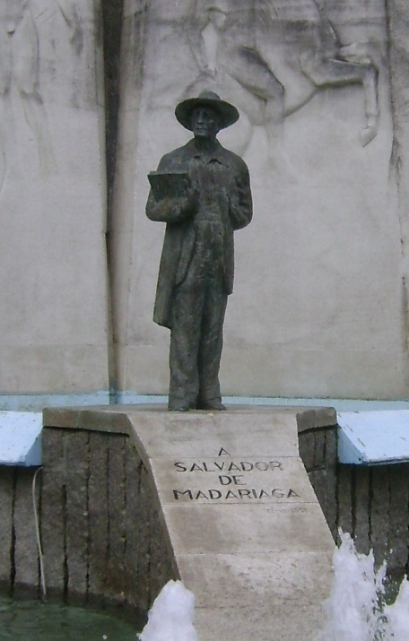 Estatua de Salvador de Madariaga en la plaza que lleva su nombre, La Coruña (España)